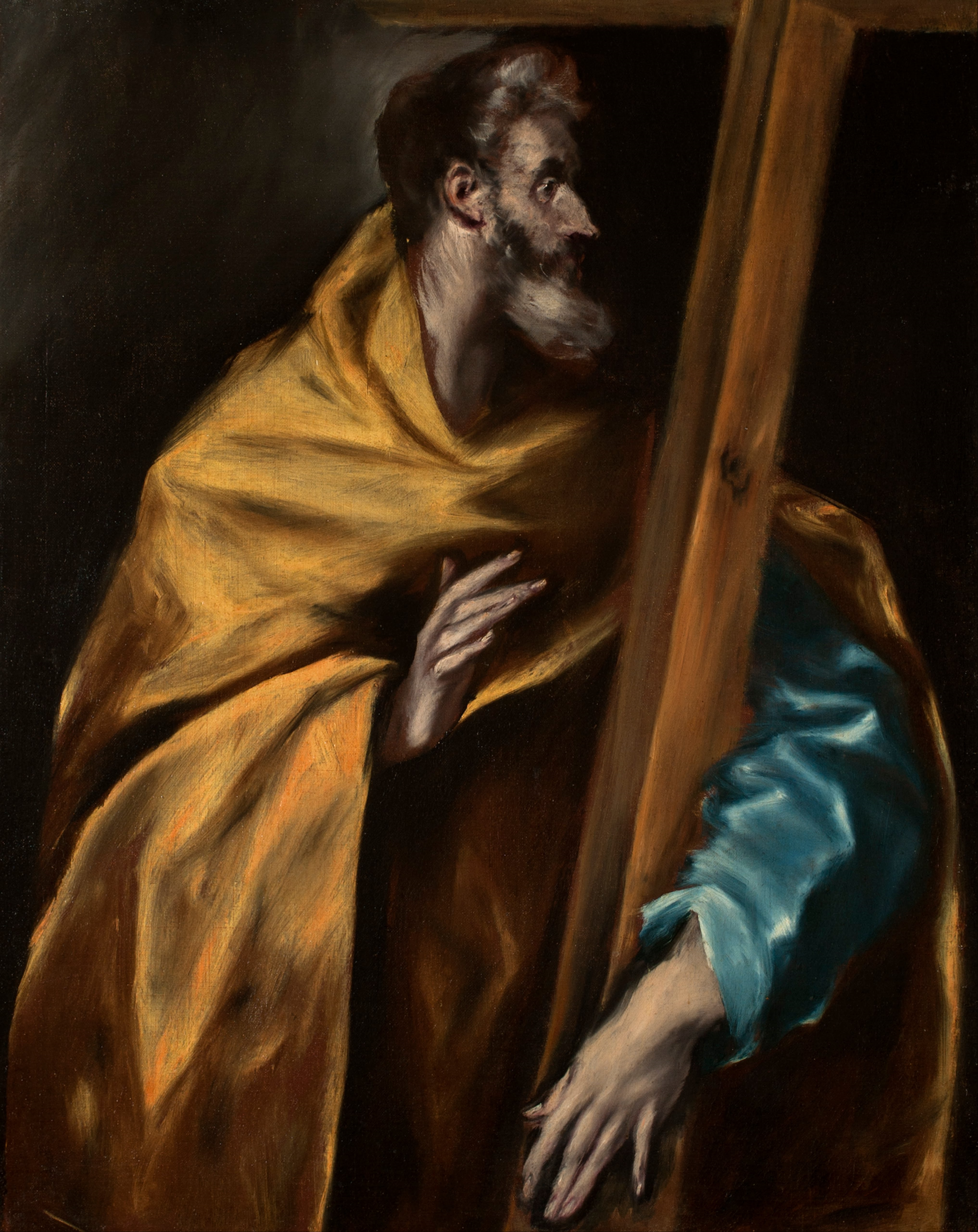 La obra representa a San Felipe Apóstol, uno de los doce apóstoles de Jesucristo.